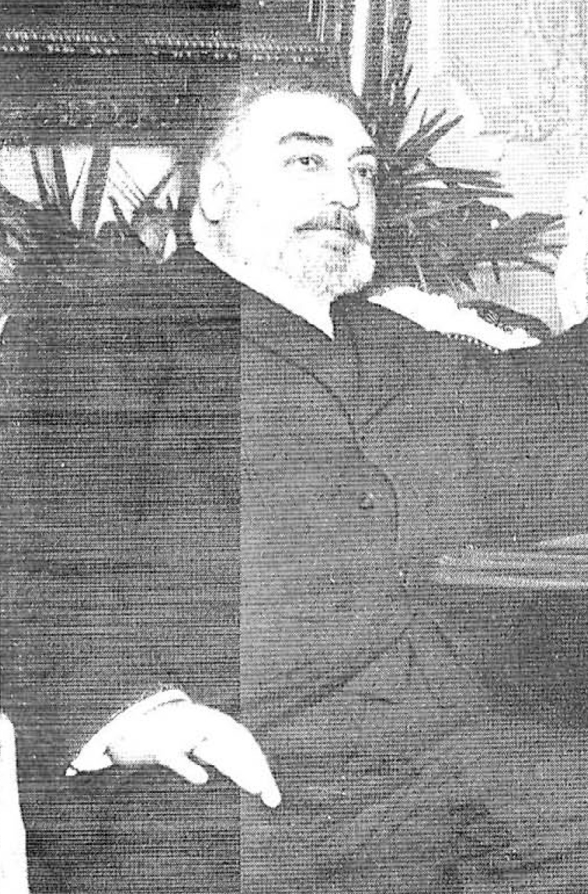 Un Consejo de Ministros en la presidencia.